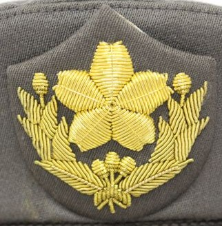 70式将官、幹部礼装